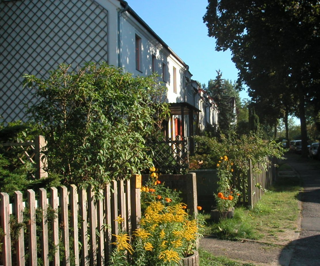 Tuschkastensiedlung, Gartenstadtweg, Berlin-Bohnsdorf